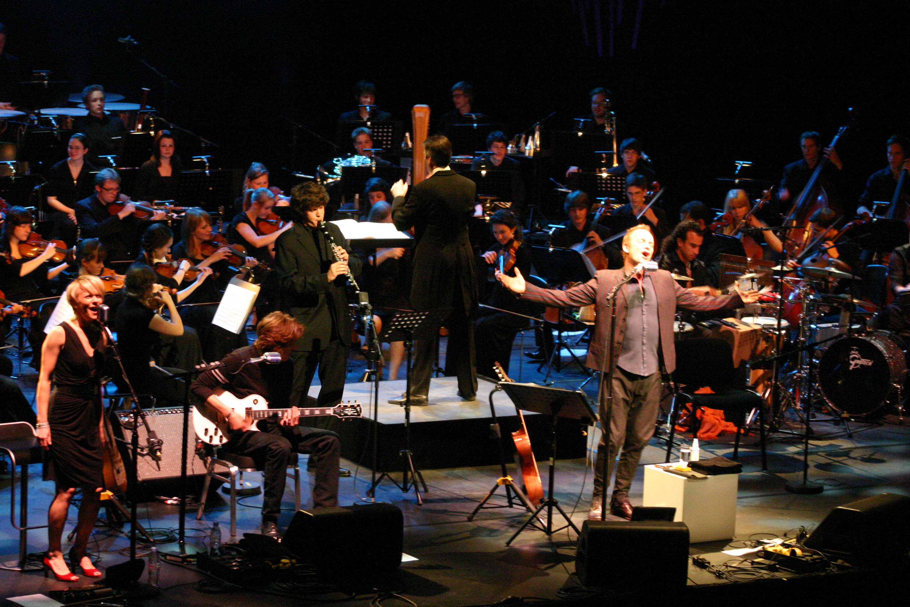 Sting und das Bundesjugendorchester, Auftritt bei den Movimentos Festwochen der Autostadt Wolfsburg